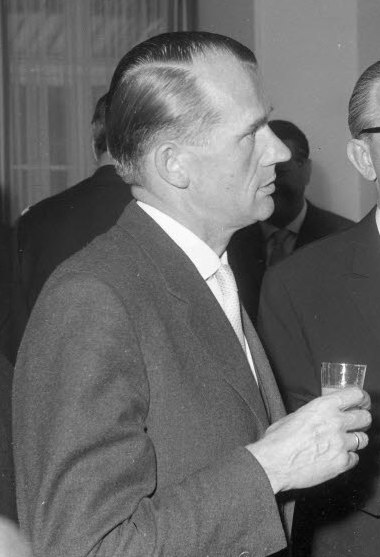 im Hotel Kieler Kaufmann im Niemannsweg 102. Im Bild Landwirtschaftsminister Ernst Engelbrecht-Greve (links), Bundesverteidigungsminister Kai Uwe von Hassel (Bildmitte) und der franz. Verteidigungsminister Pierre Messmer (rechts).